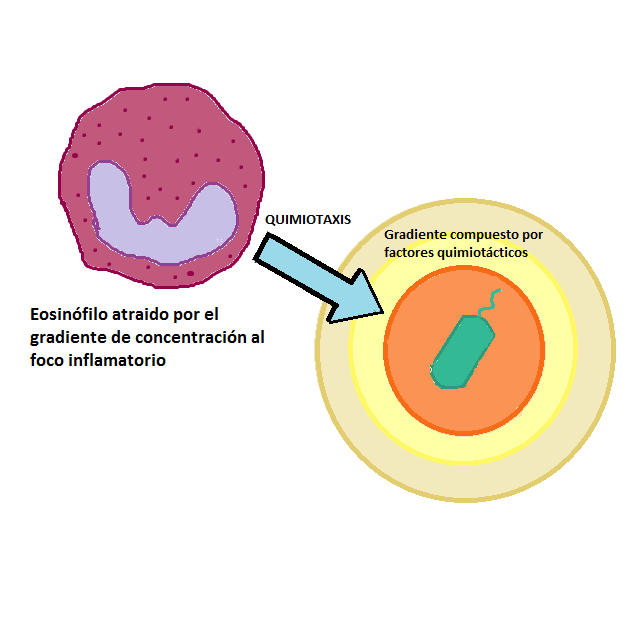 Proceso de quimiotaxis de un eosinófilo al foco inflamatorio